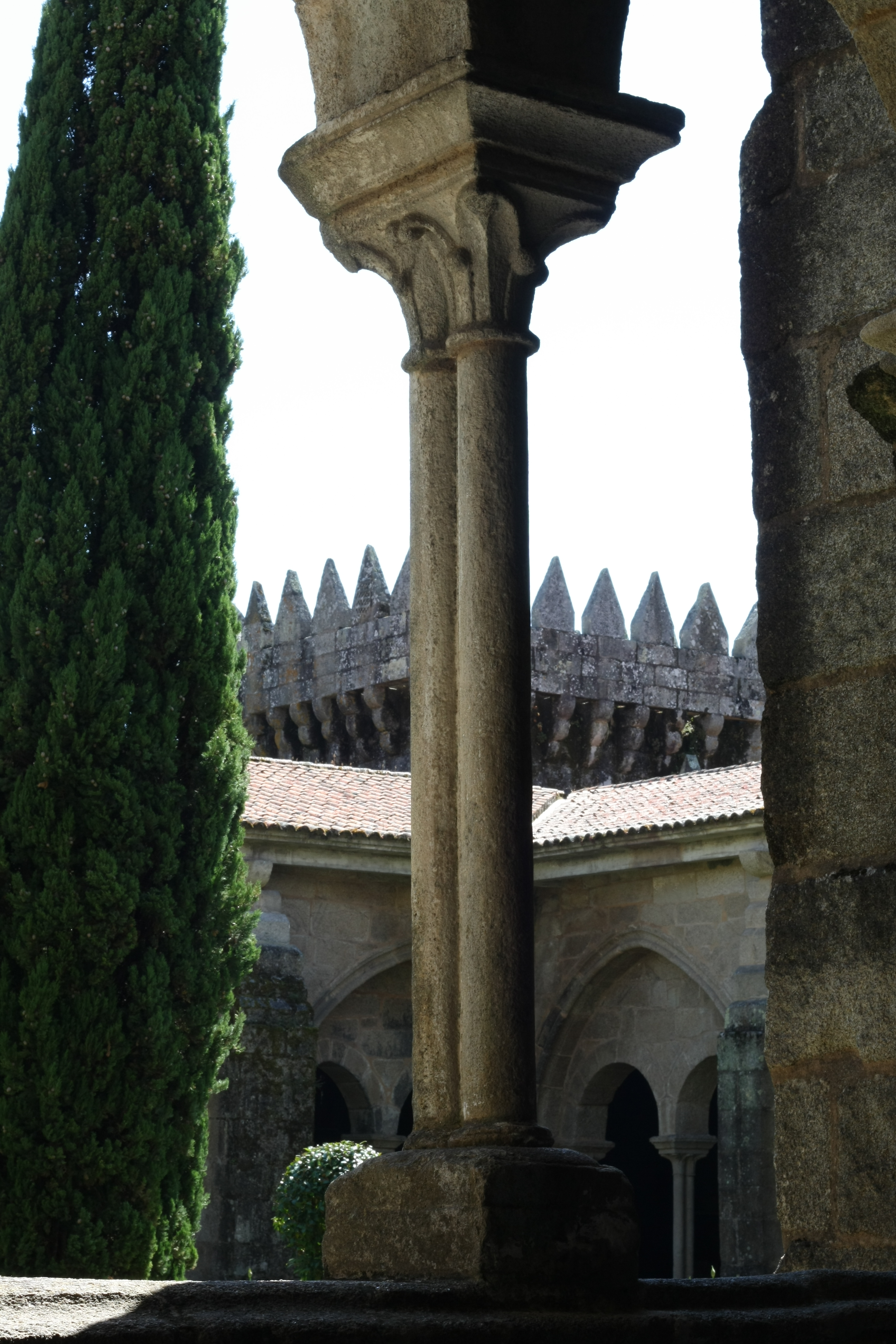 Kathedrale Santa Maria in Tui (Galicien), Kreuzgang